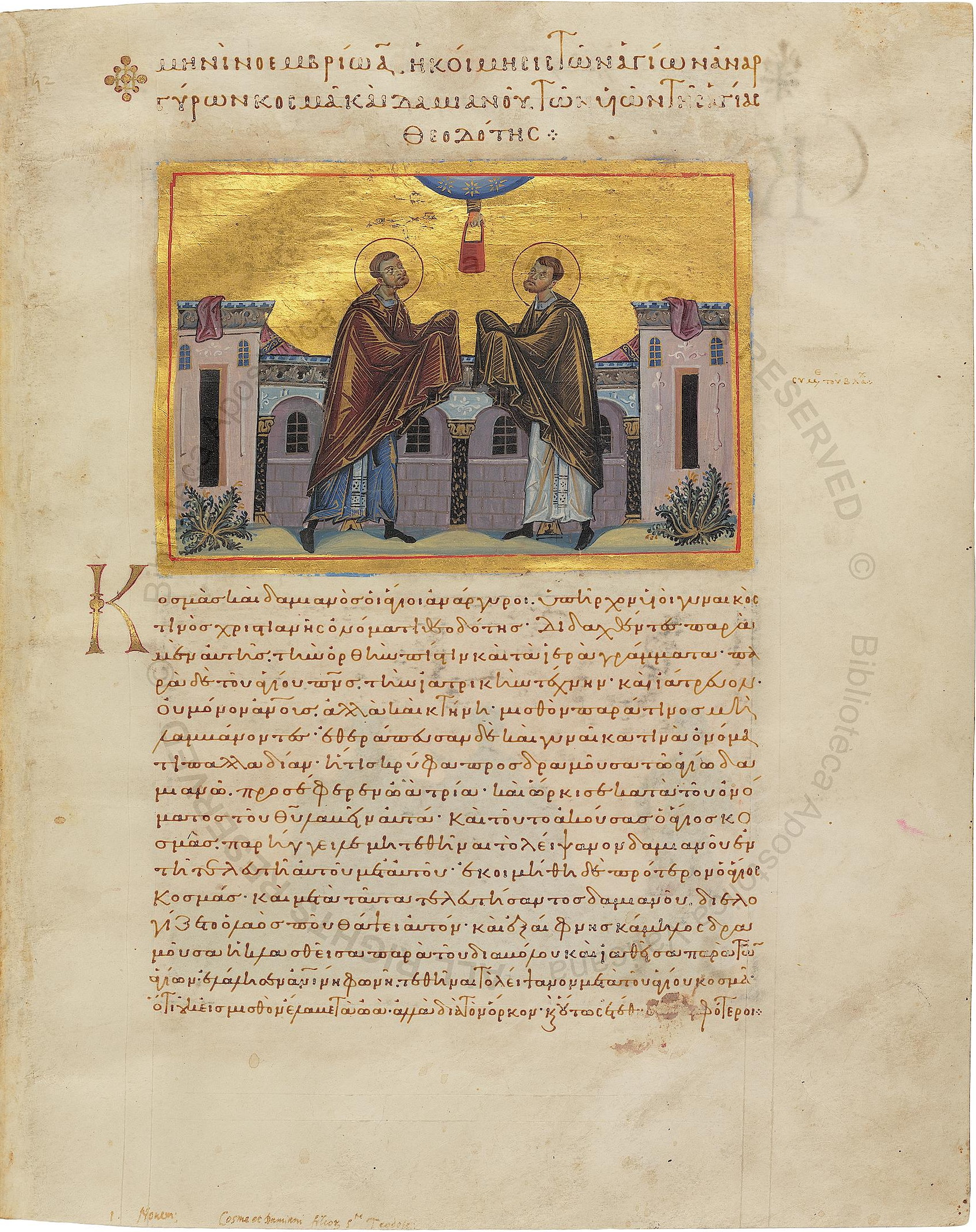 Menologion of Basil II / Лист из Минология Василия II с миниатюрой, где изображены святые Косма и Дамиан (Fol. 152)